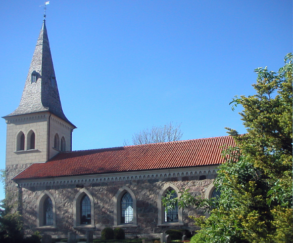 Västra Strö kyrka